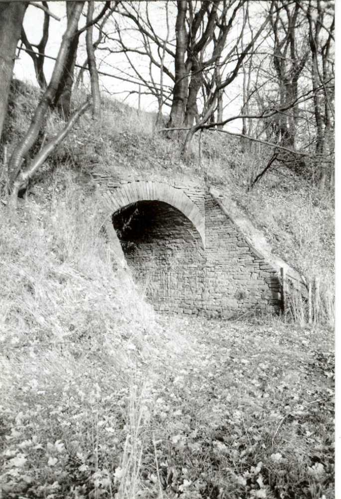 Eine Wegunterführung der Silscheder Kohlenbahn in Gevelsberg-Silschede, zugleich Durchlass für die Teimbecke (eigentlich verrohrt, z.T. überlaufend)